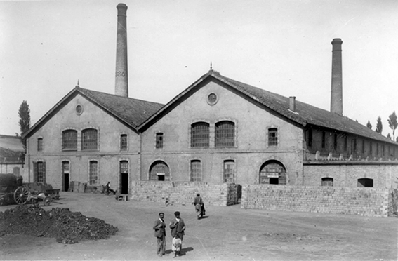 Gran Tejería Mecánica Pamplonesa